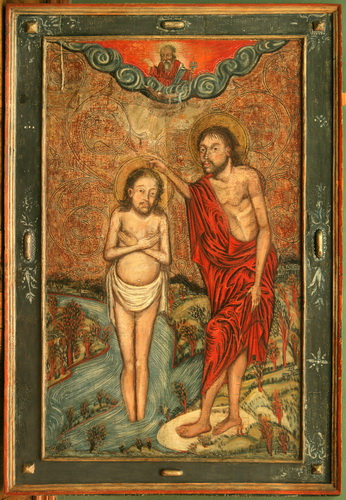 Вадохрышча (Богаяўленне). Сярэдзіна ХVІІІ ст. Дрэва, ляўкас, тэмпера. 122х84 см Паходзіць з Пакроўскай царквы, в. Андронава Брэсцкай вобл.